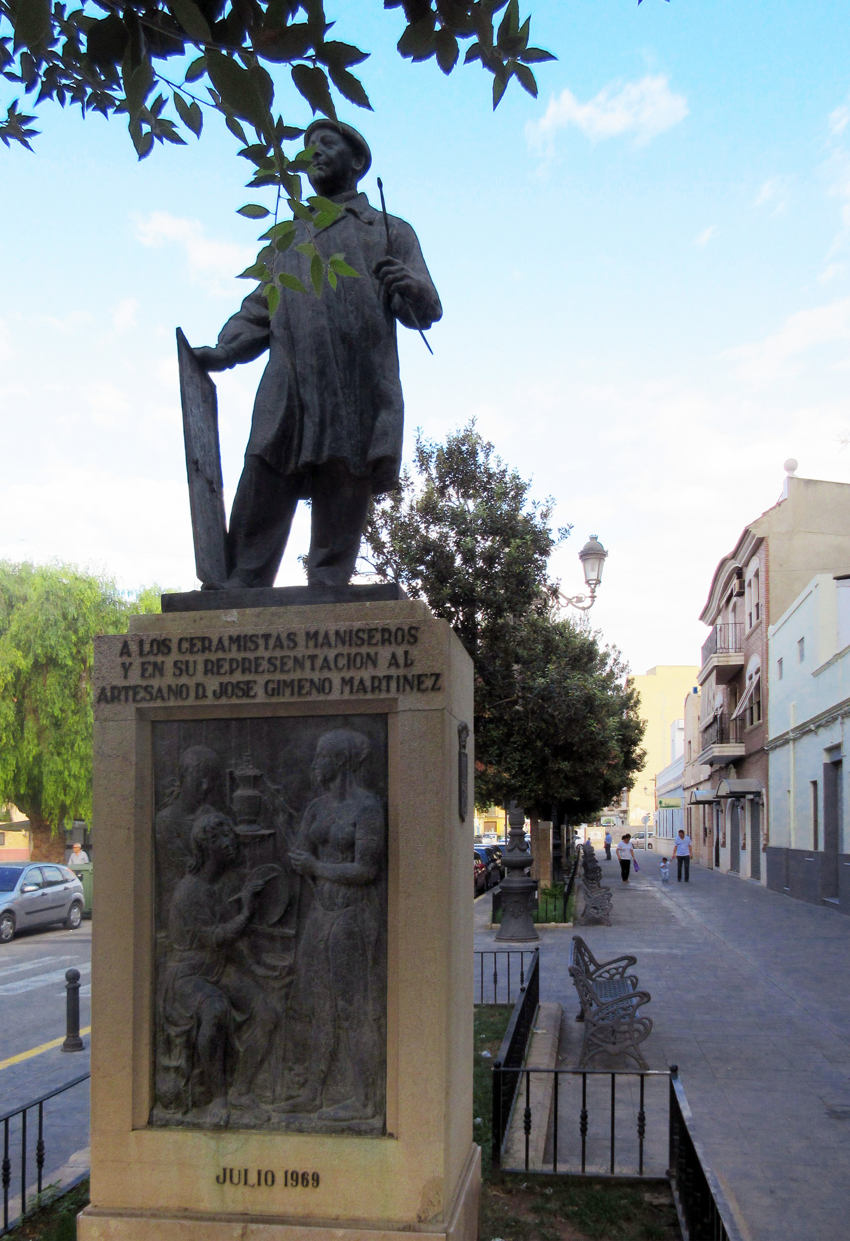 Statut (1969) du céramiste espagnol José Gimeno Martínez (1889-1967)